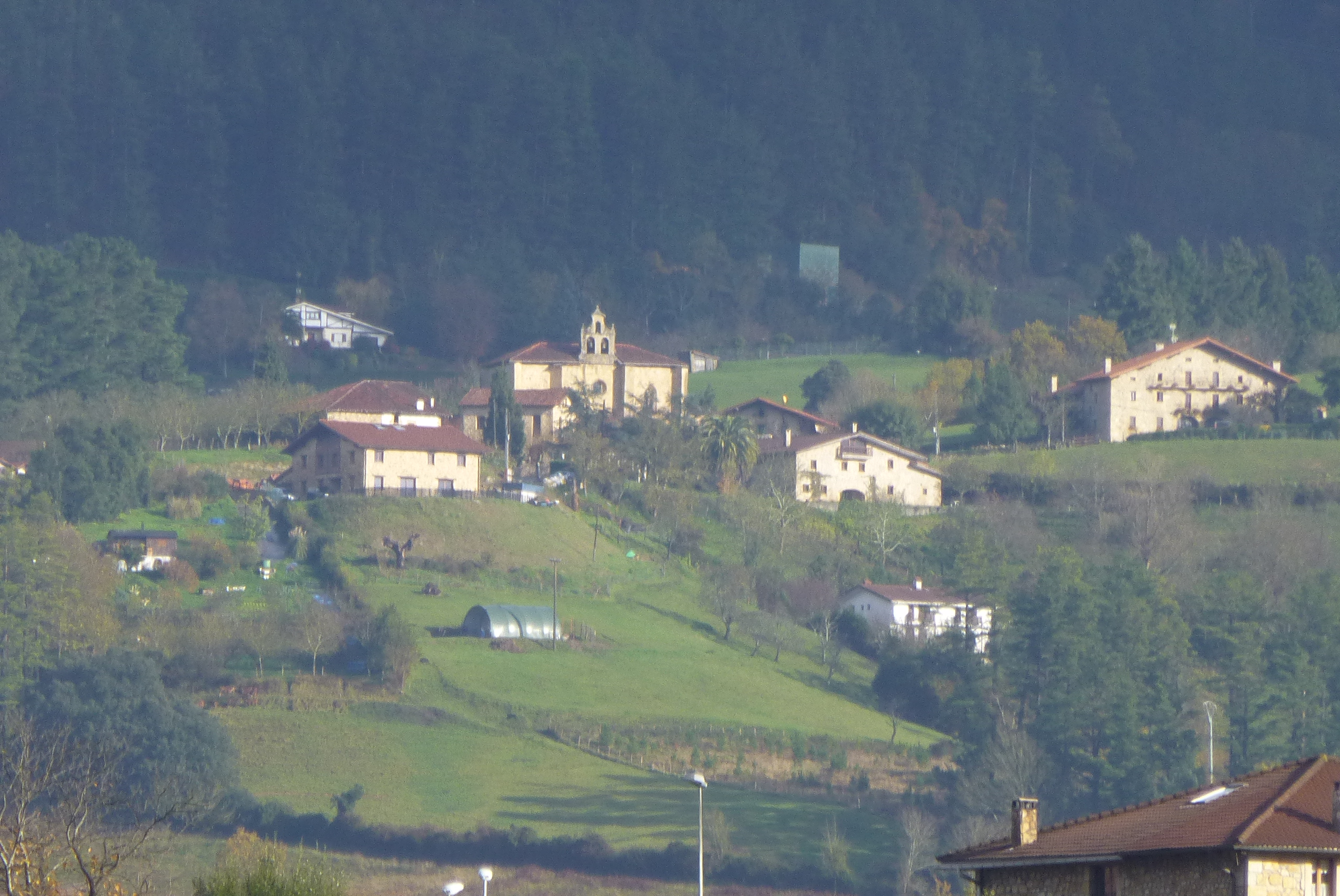 Vista general del barrio Andikona de Berriz en Bizkaia, País Vasco (España)